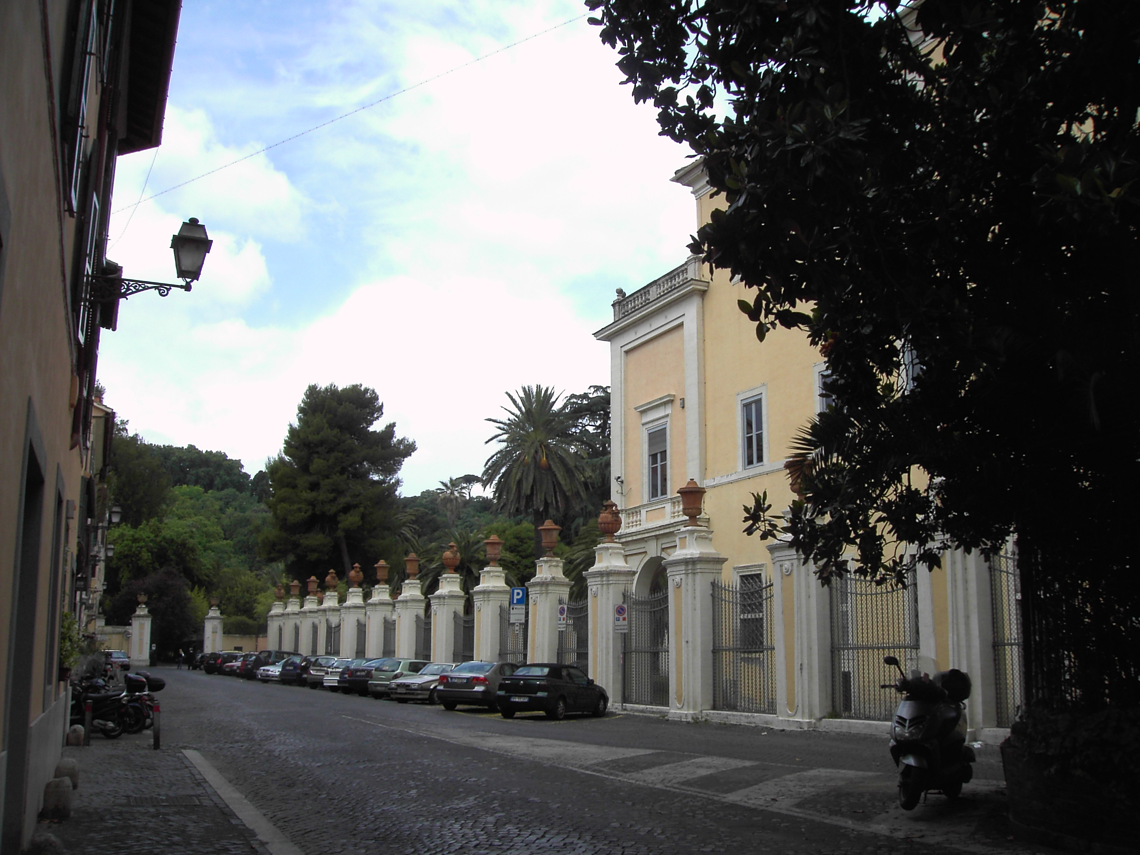 Roma, via di Villa Corsini - ingresso all'Orto botanico (sulla destra, Villa corsini)